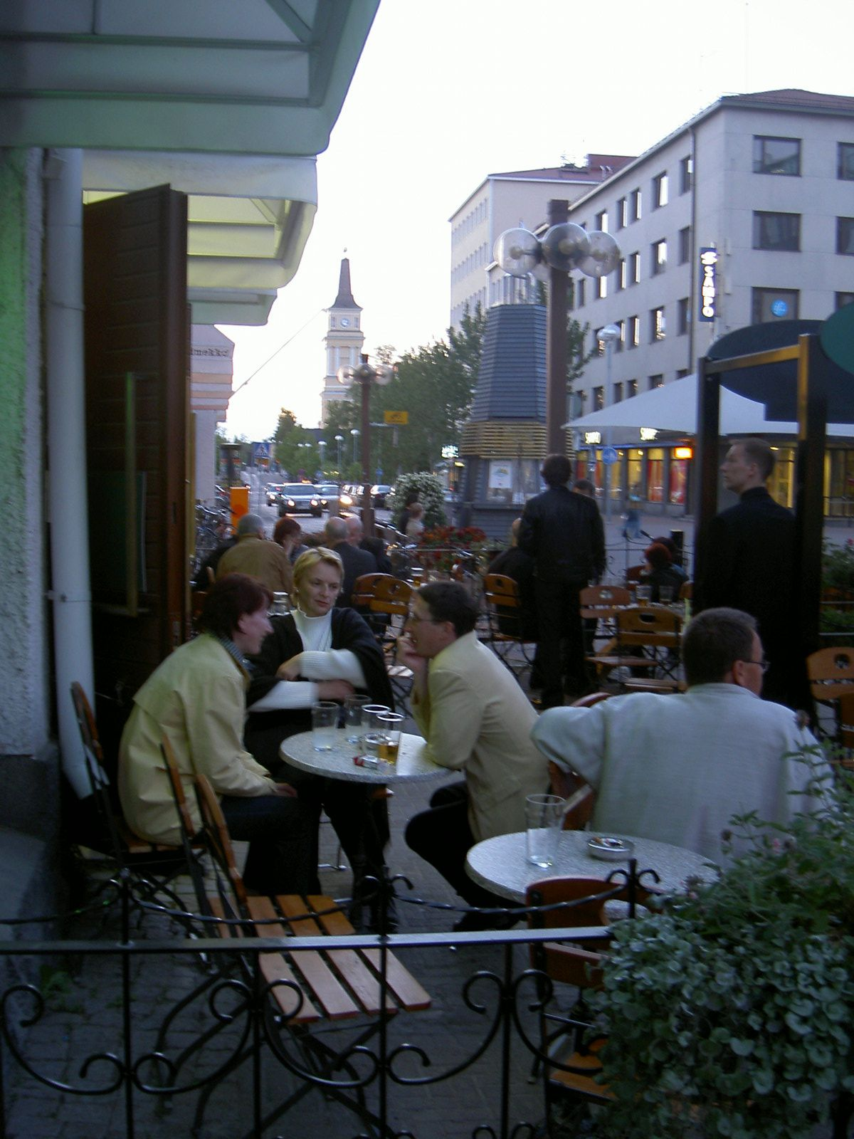 Oulu Rotuaru ByNight Sajat digitalis kamera. --Math 2005. augusztus 1., 17:54 (CEST) Oulu, Rotuari Ejjel hivatkozando forras: Brendel Matyas